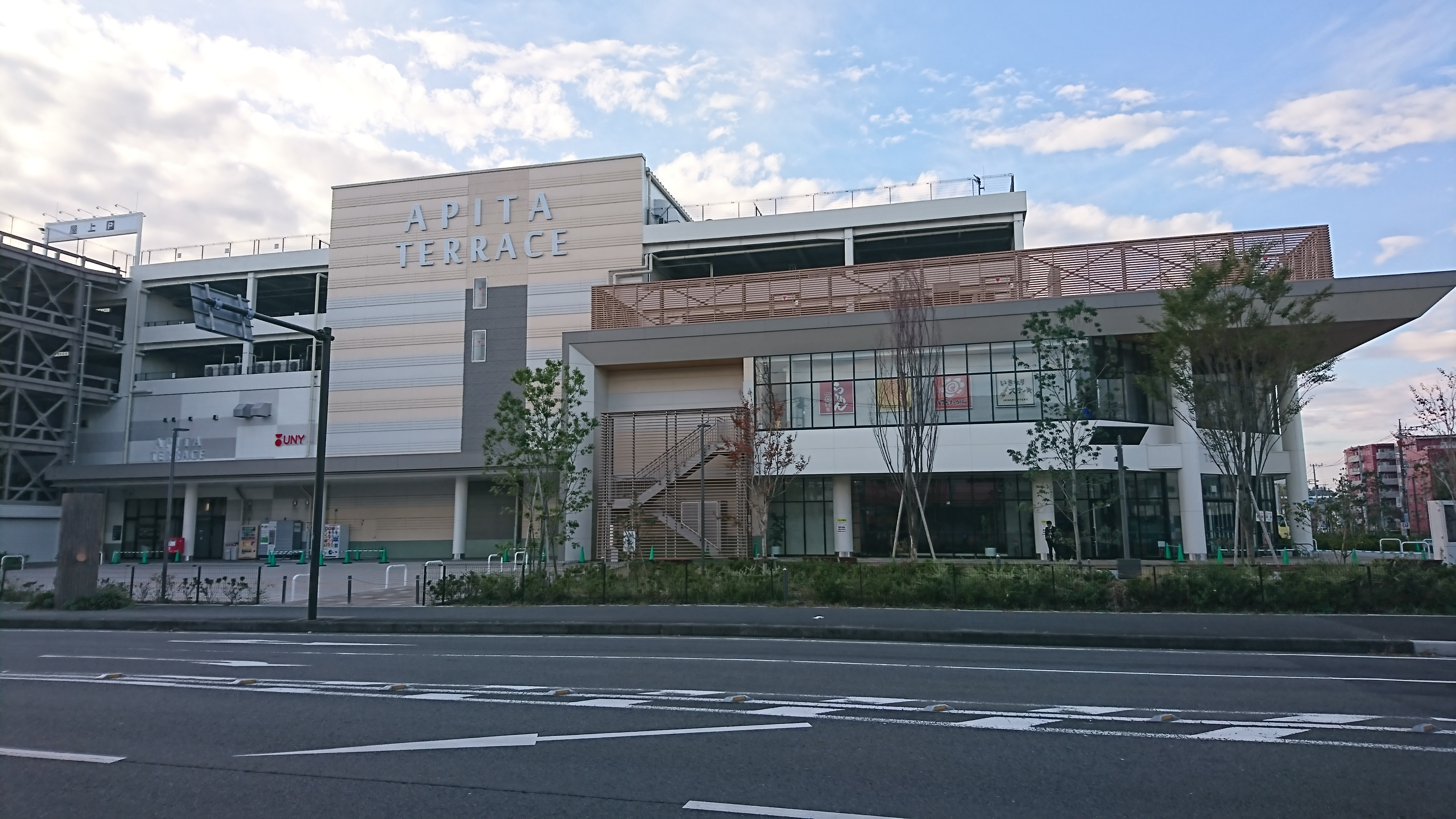 アピタ綱島店店舗概観